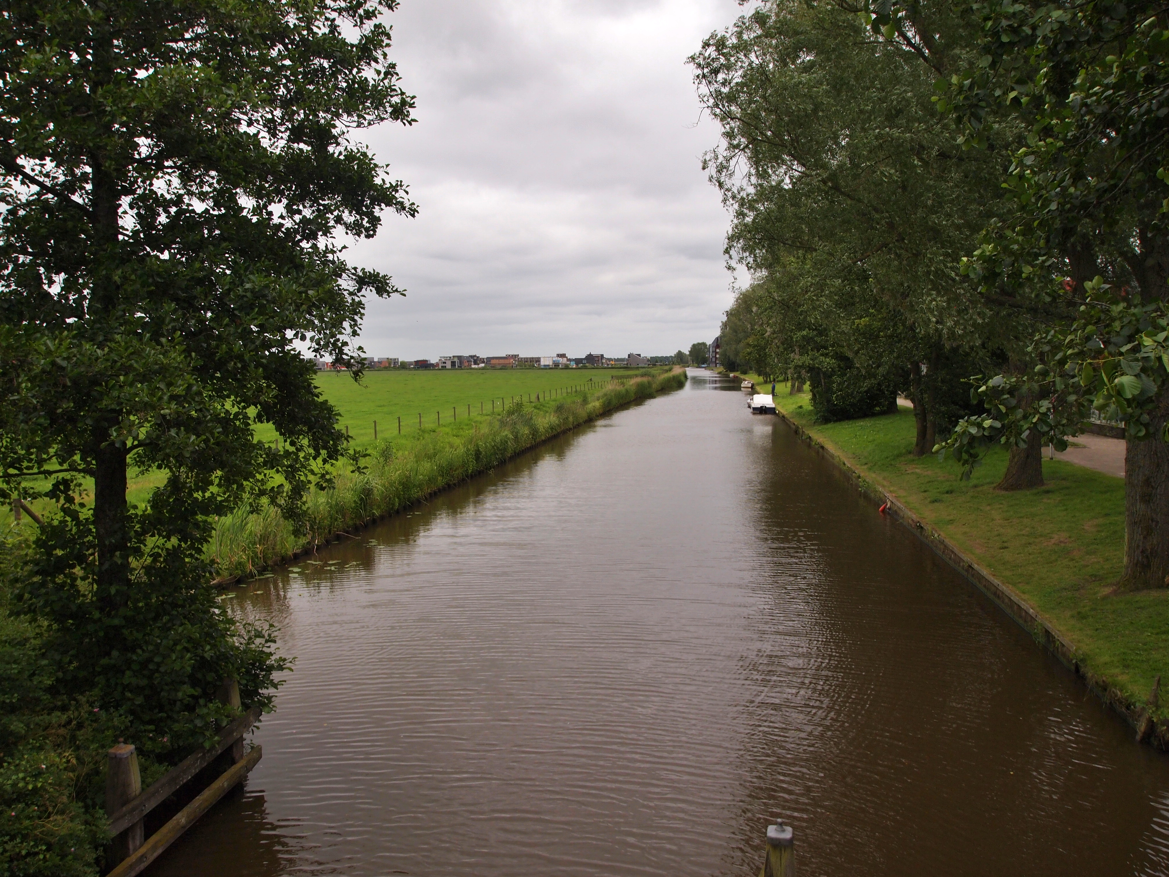 De Bonkevaart (Bonkefeart).